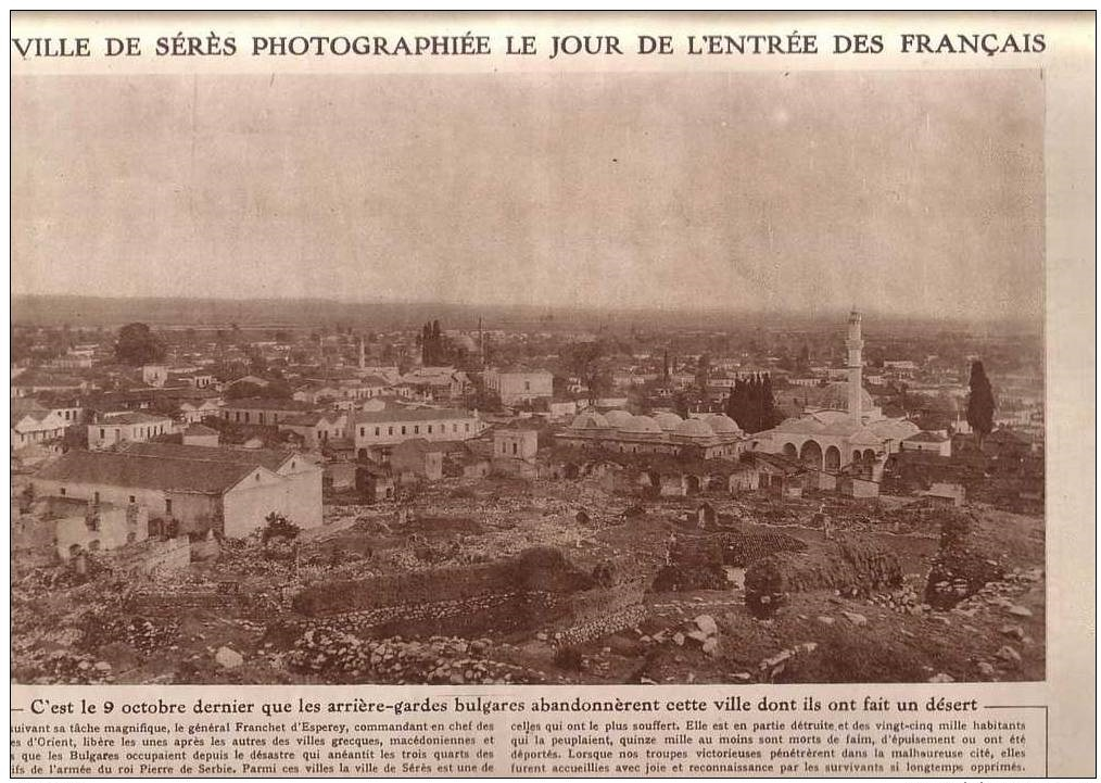 Панорама на Сяр в деня на влизането на френски войски в края на Първата световна война